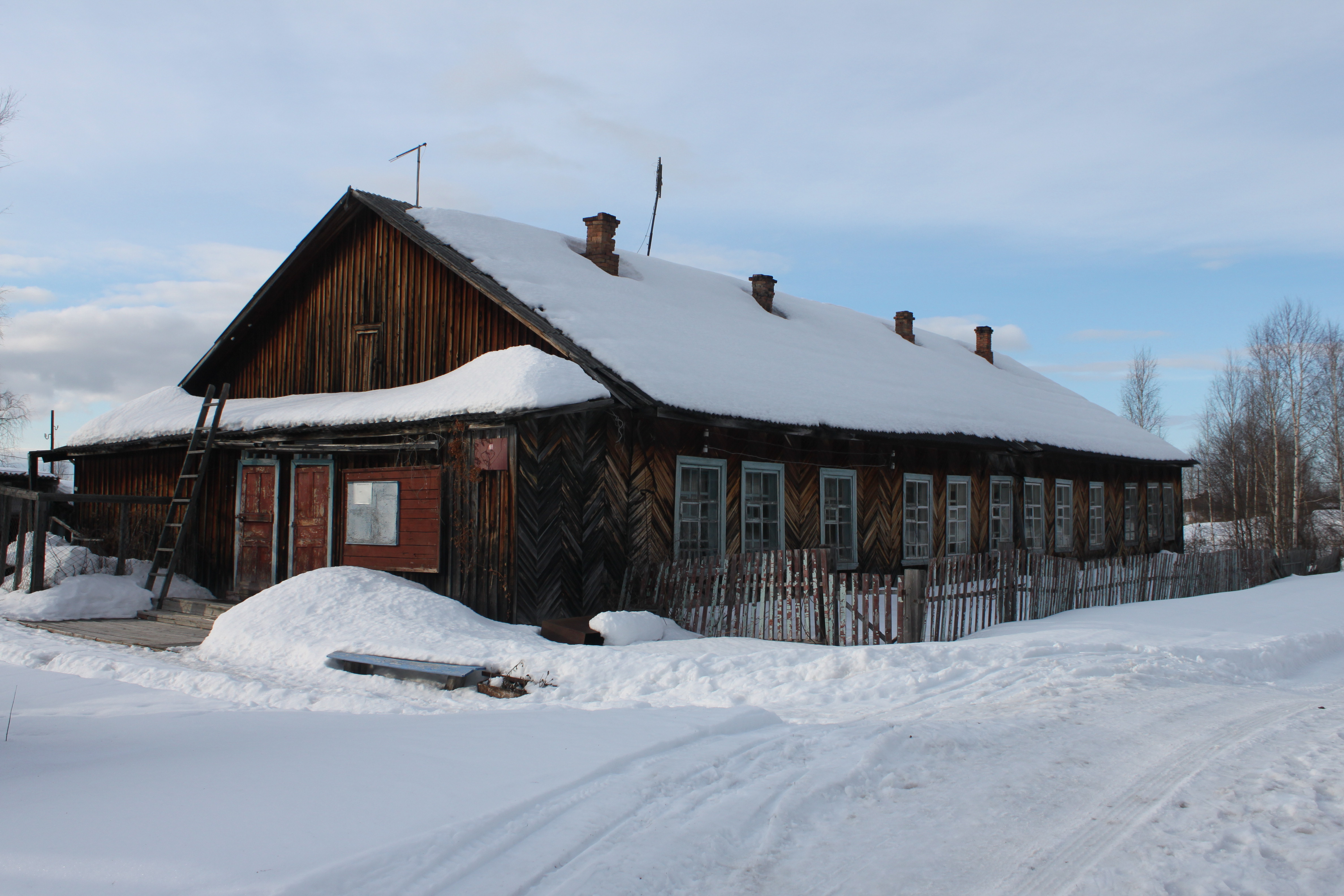 Поселок Новый Вагиль. Сельсовет и почта